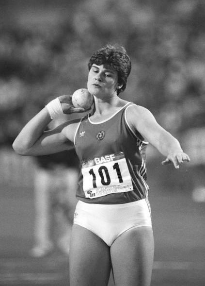 ADN-ZB/Thieme 26.8.1986 BRD: Leichtathletik-EM Den ersten Titel für die DDR bei den 14. Leichtathletik-Europameisterschaften in Stuttgart errang im Kugelstoßen Heidi Krieger, SC Dynamo Berlin, mit einer Weite von 21,10 Metern.